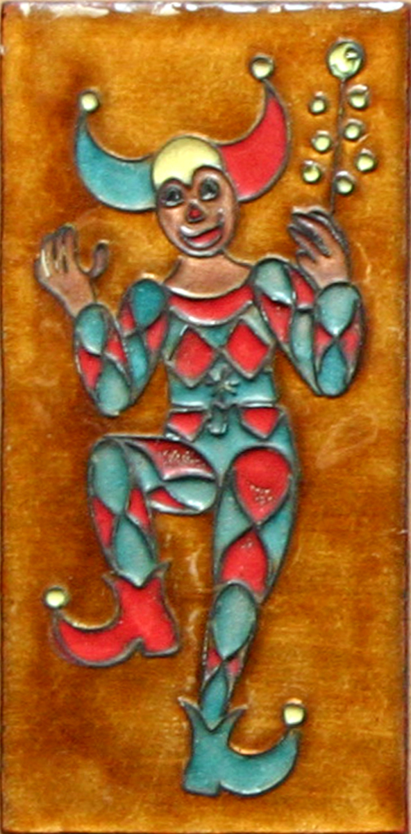 1 van de 10 paneeltjes van het emaillekunstwerk 'de schilderijententoonstelling van Moussorgski' van Jos Melchers.